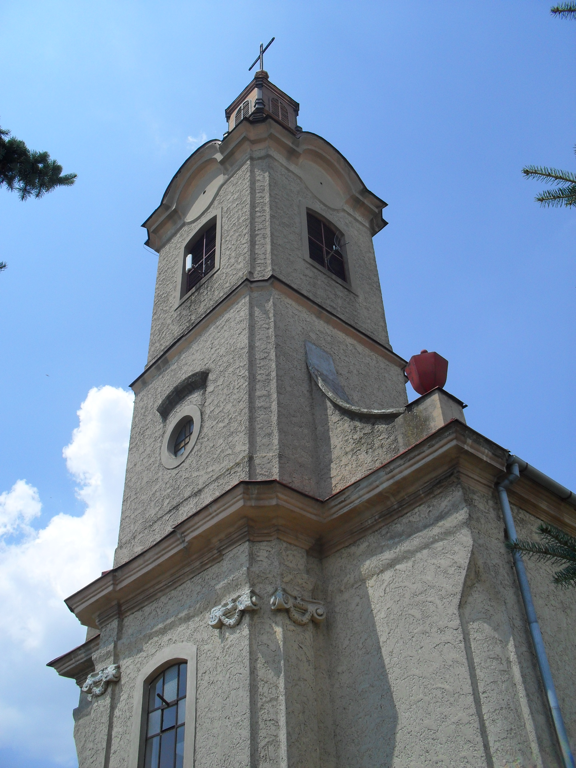 Véke - katolikus templom